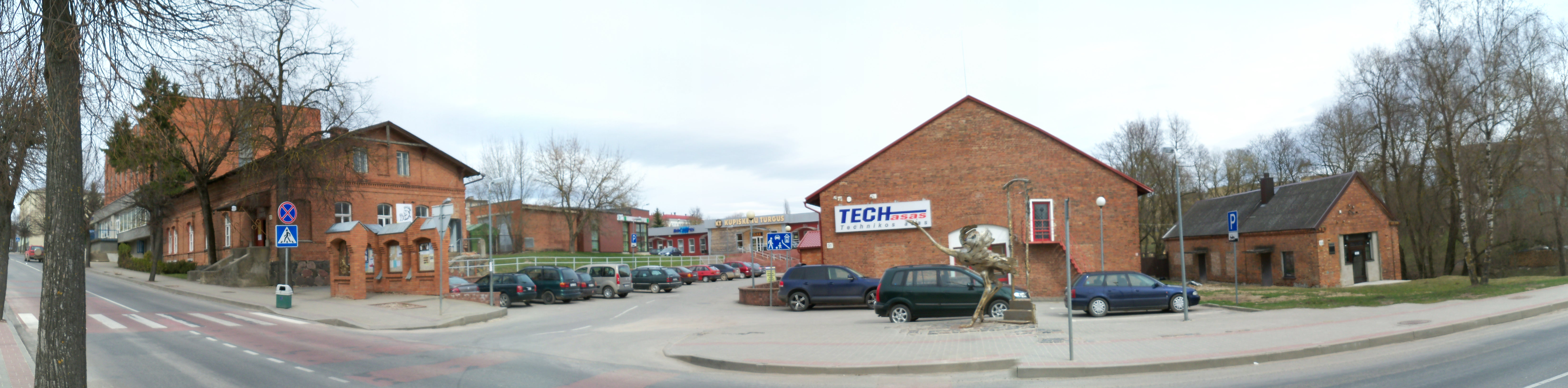 Kupiškio valsčiaus pasatų kompleksas.